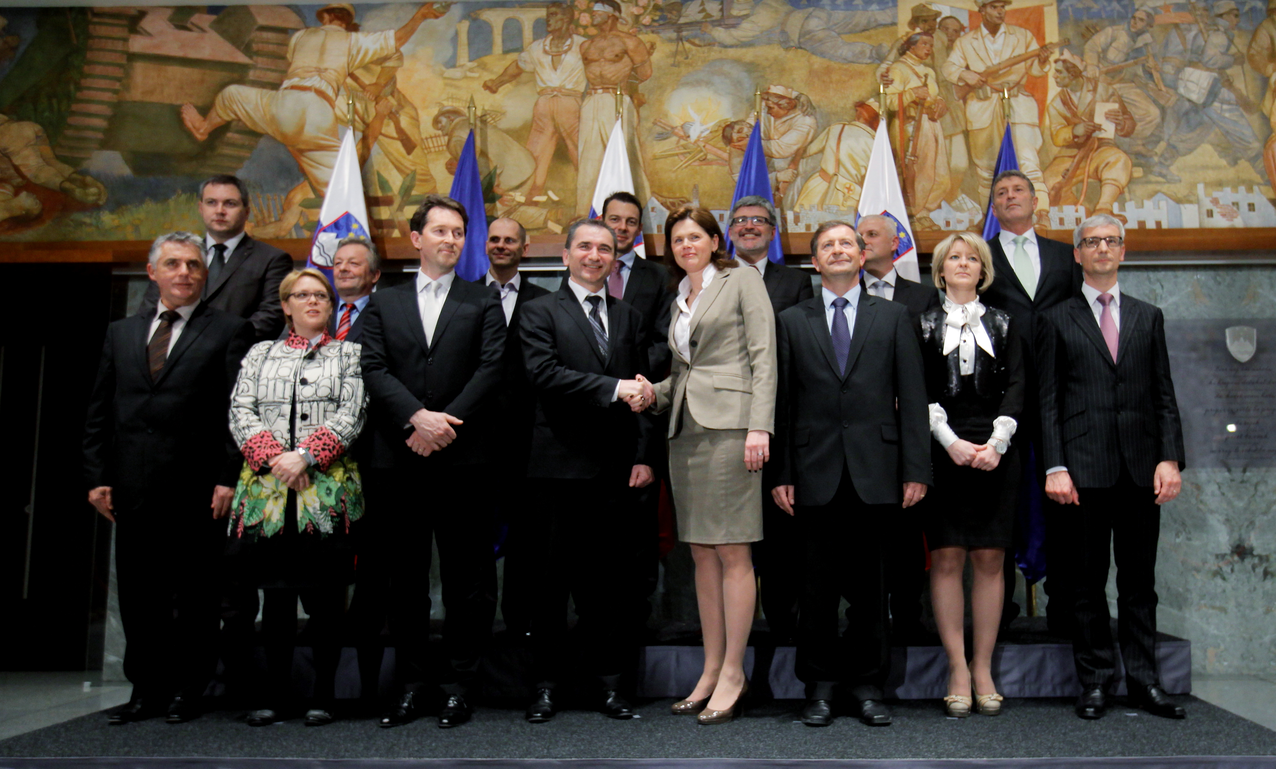 Skupinska fotografija 11. slovenske vlade s predsednikom državnega zbora